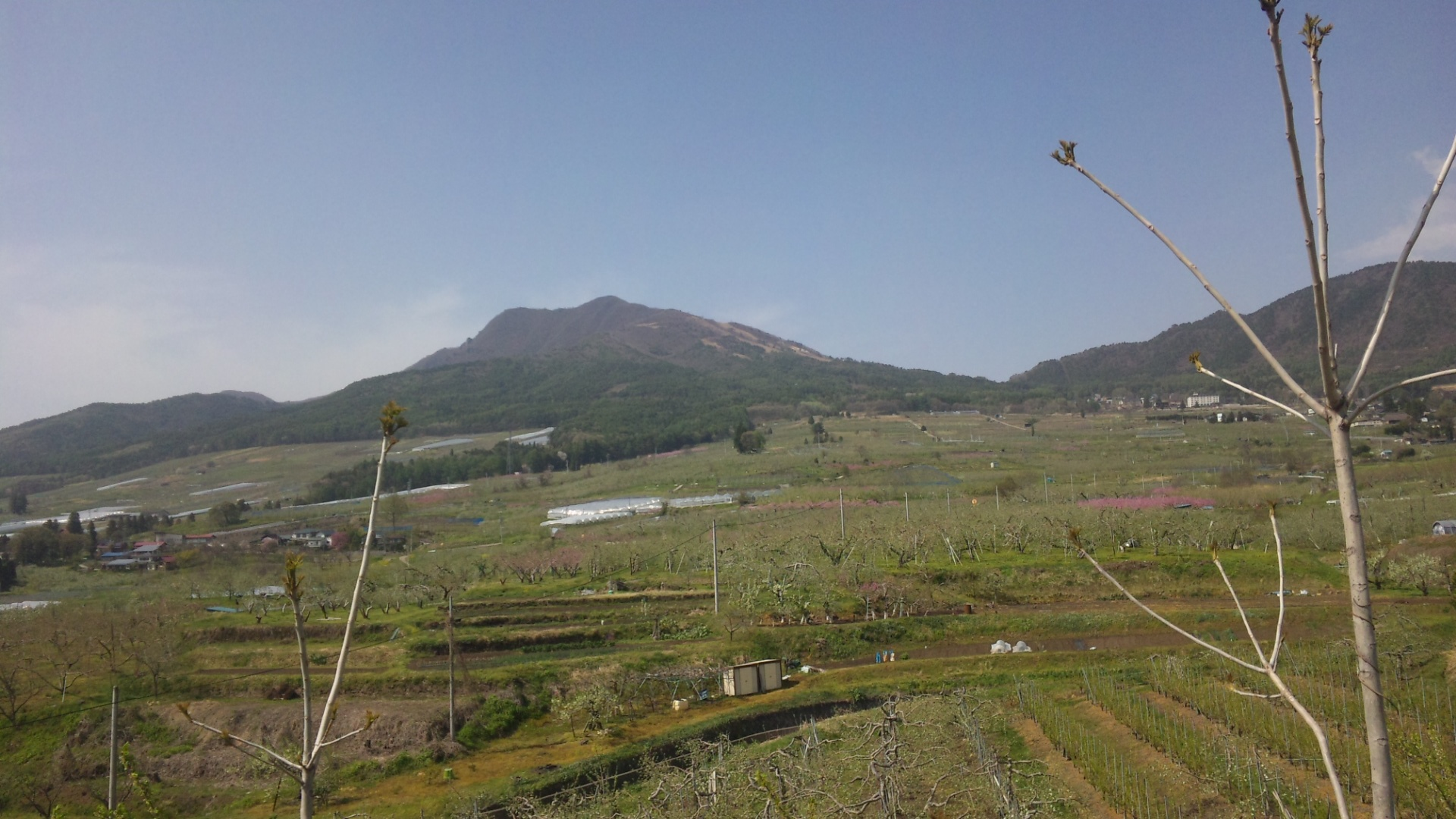 山ノ内町の風景。奥は高社山。私の携帯電話NTTドコモ SH-01Bにて撮影。